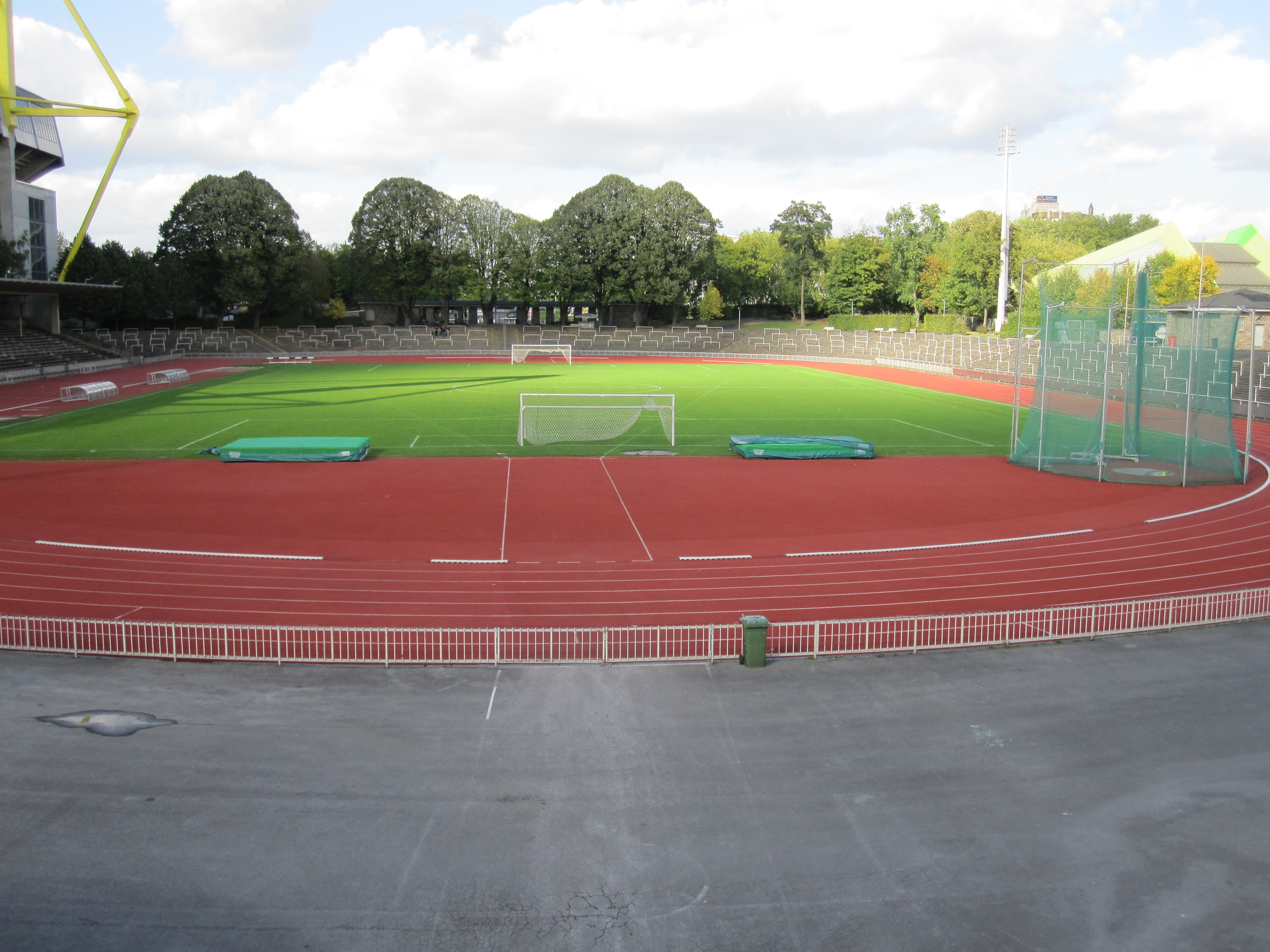 Blick von oberhalb des Marathontors des Stadions "Rote Erde" in Dortmund auf das Spielfeld